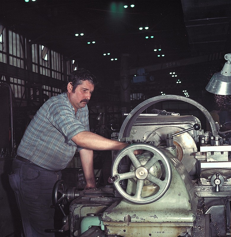 Original image description from the Deutsche FotothekDreher